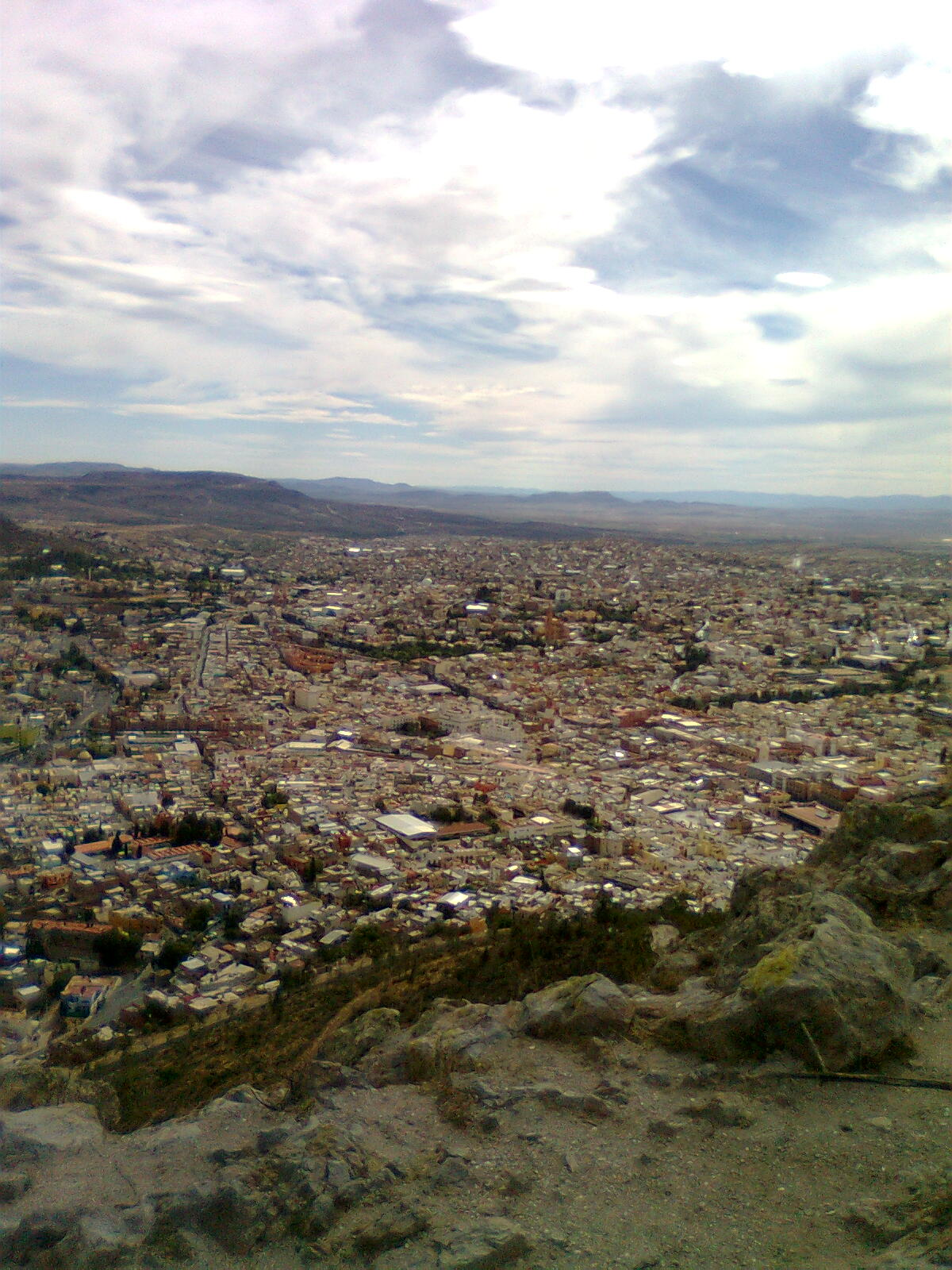 Zacatecas desde la cima de La Bufa.